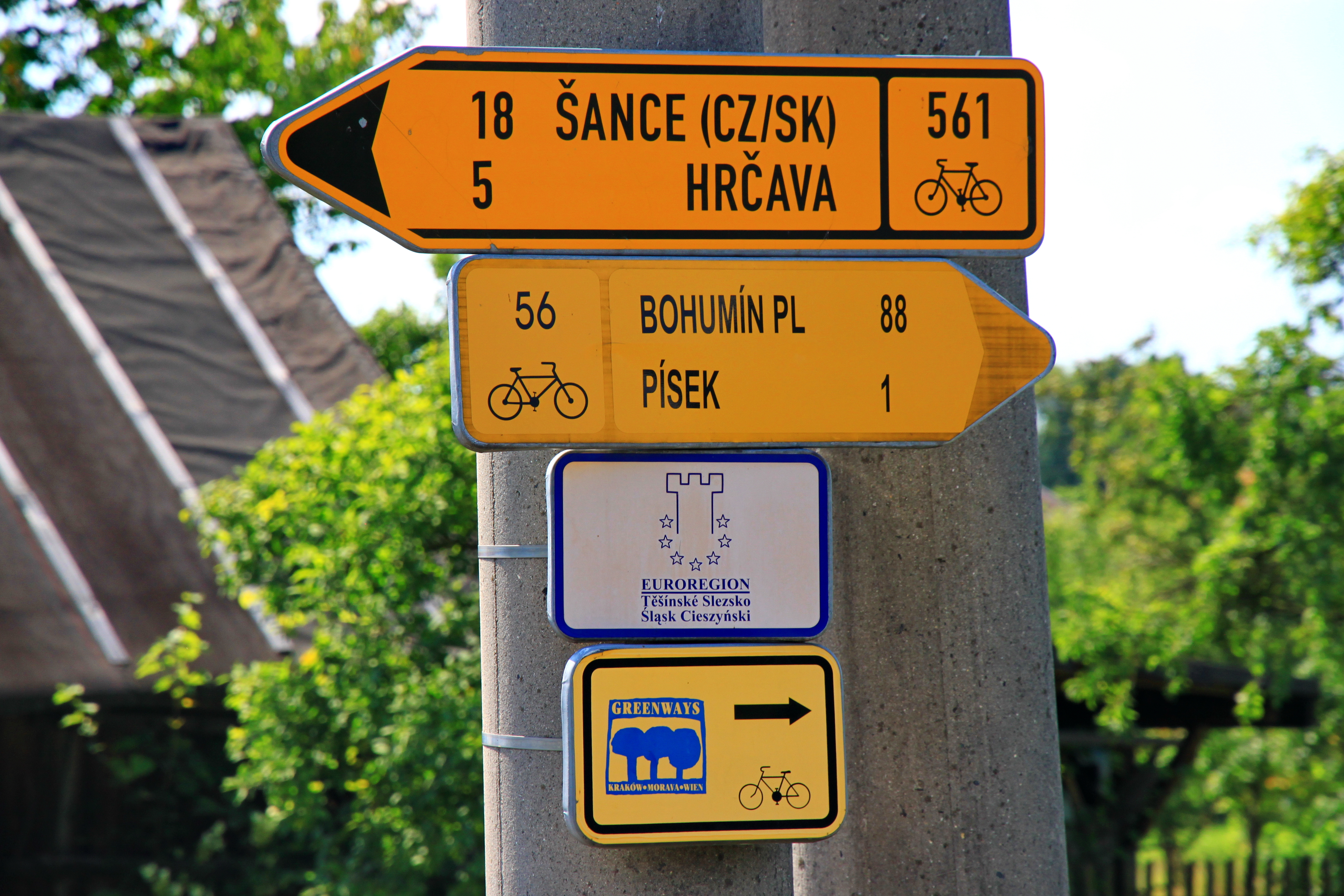 Tabliczki tras rowerowych w Bukowcu: międzynarodowej trasy rowerowej Greenways Kraków-Morawy-Wiedeń (nitki górskiej), trasy nr 561 oraz trasy nr 56